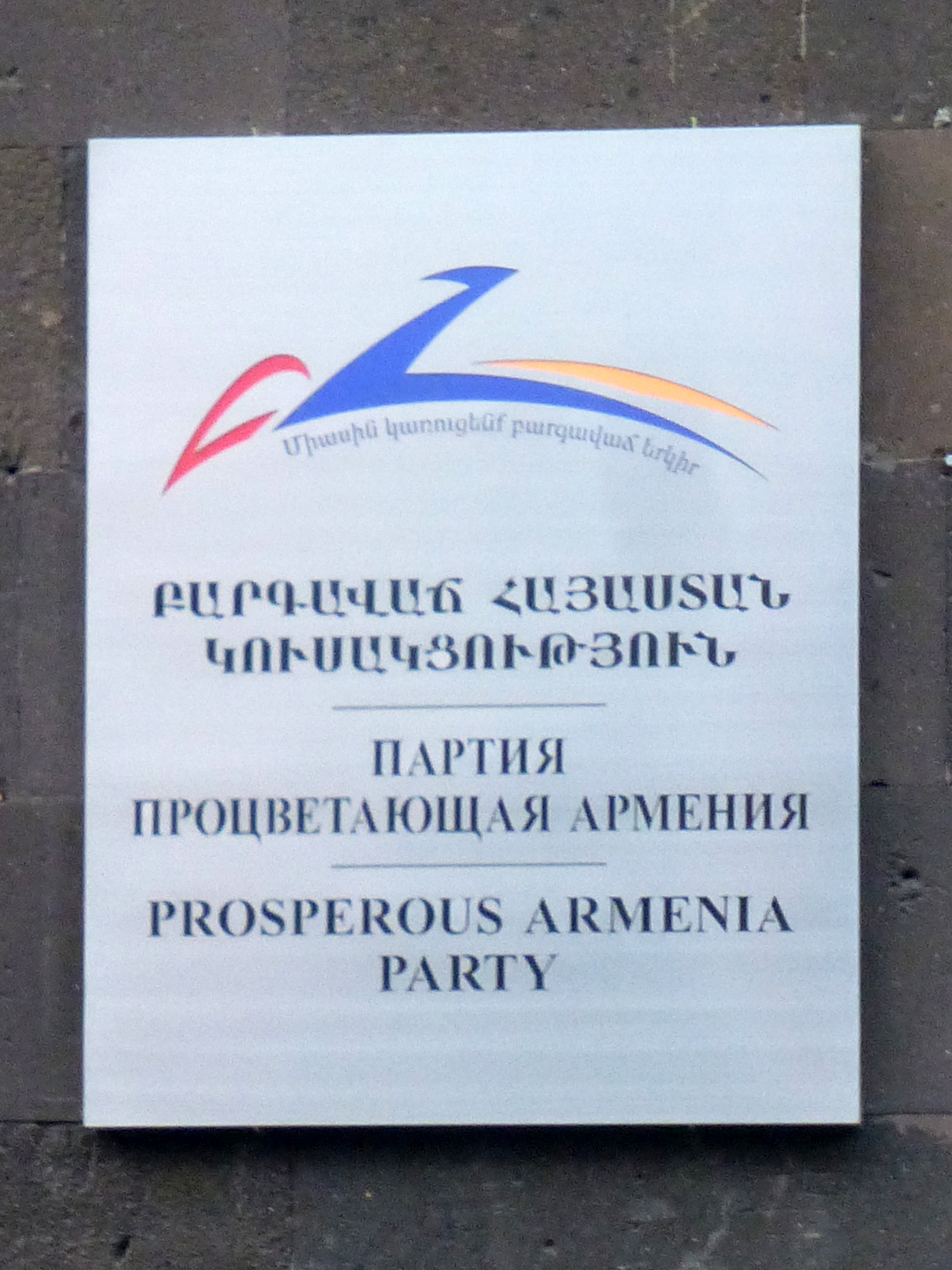 Erevan (Arménie) : bureaux du parti politique Arménie prospère.